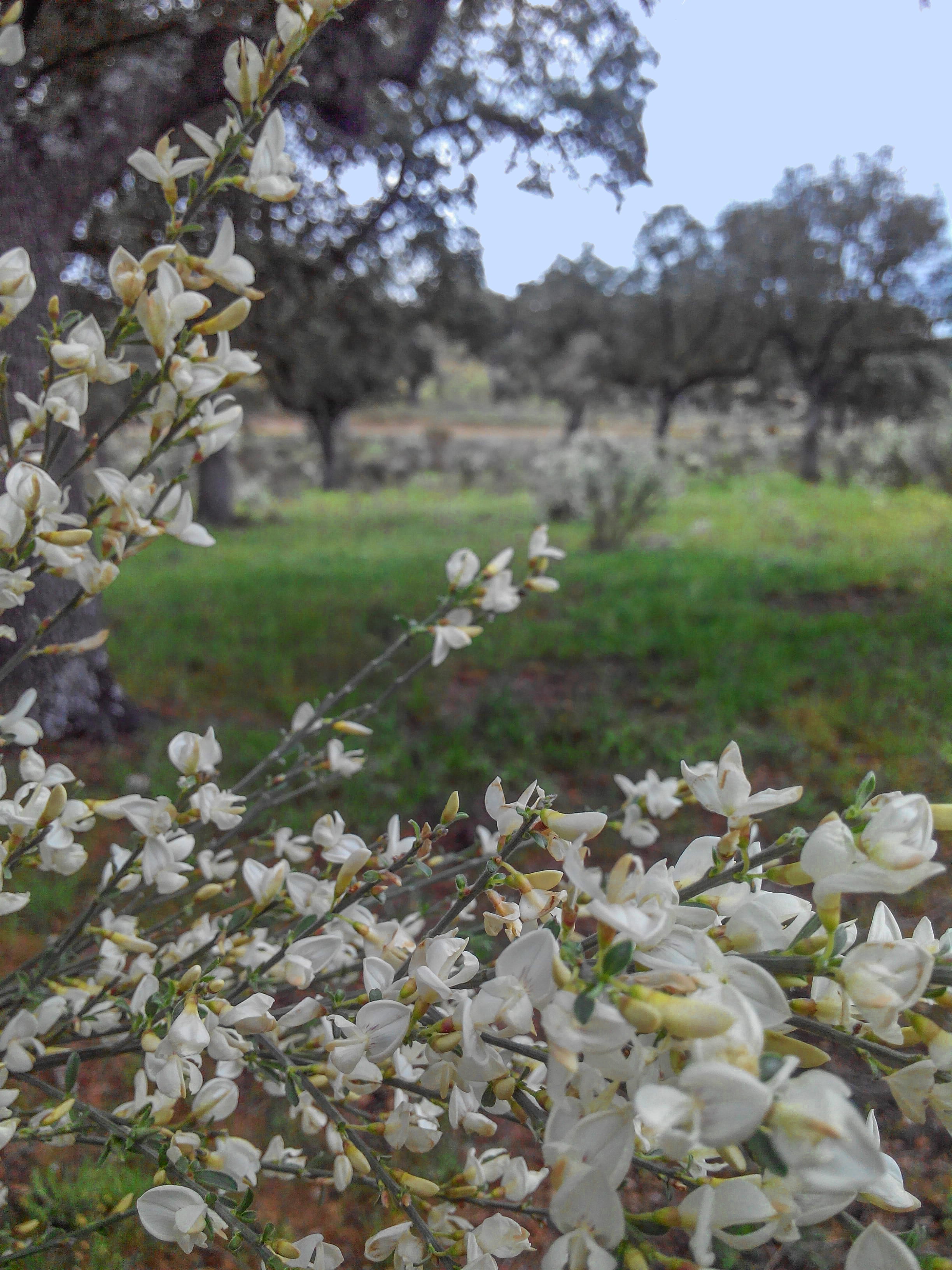 Campo de Azaba This is a photography of a Site of Community Importance in Spain with the ID: ES4150100. Natura2000 entry, EEA entry